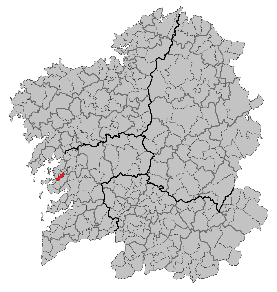 Mapa coa localización do concello de Ribadumia.